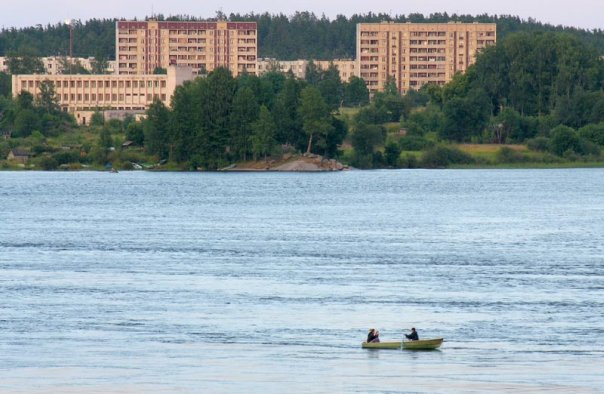 Вид города Каменногорска с полуострова Рябиновый